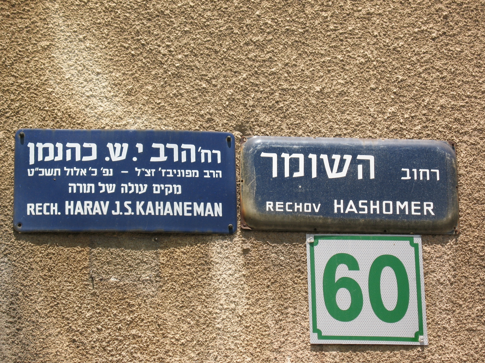 בית ברחוב כהנמן הנושא שלט של השם הקודם והשם החדש